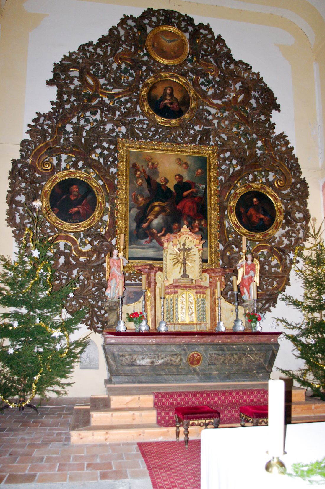 Krajková, okres Sokolov, rokokový oltář v kostele svatého Petra a Pavla s akantovými ornamenty, mistrovská dřevořezba z 18. století. více